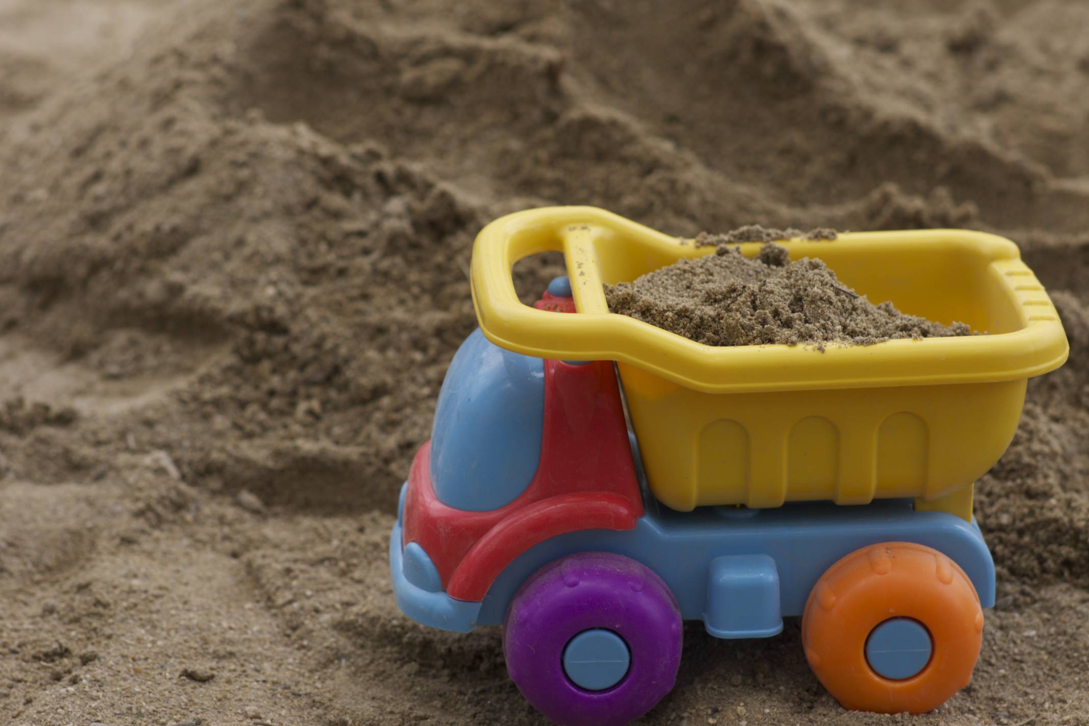 通称飛行機公園にて。